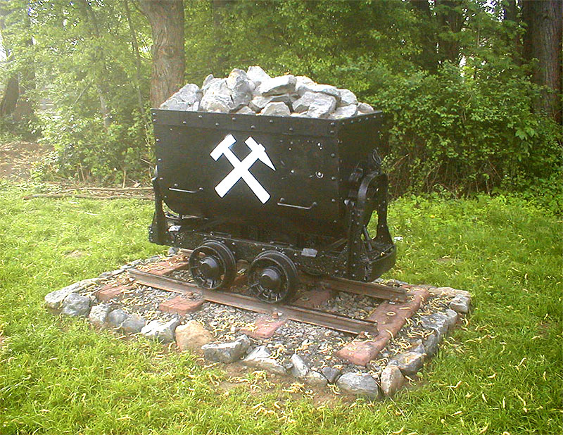 Kipphunt als Denkmal zur Erinnerung an den Eisenerzbergbau und die Eisenerzgrube Porta in Minden-Häverstädt, Nordrhein-Westfalen.